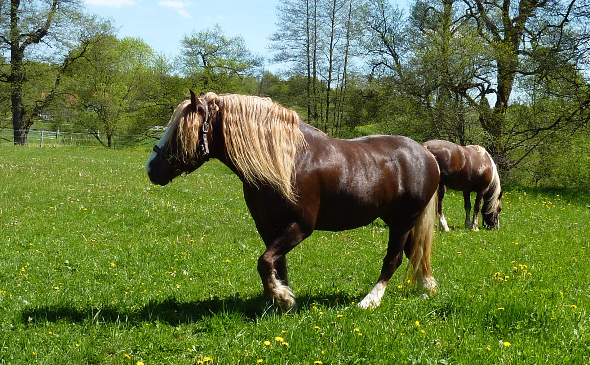 Schwarzwälder Kaltblüter auf der Weide in Marbach